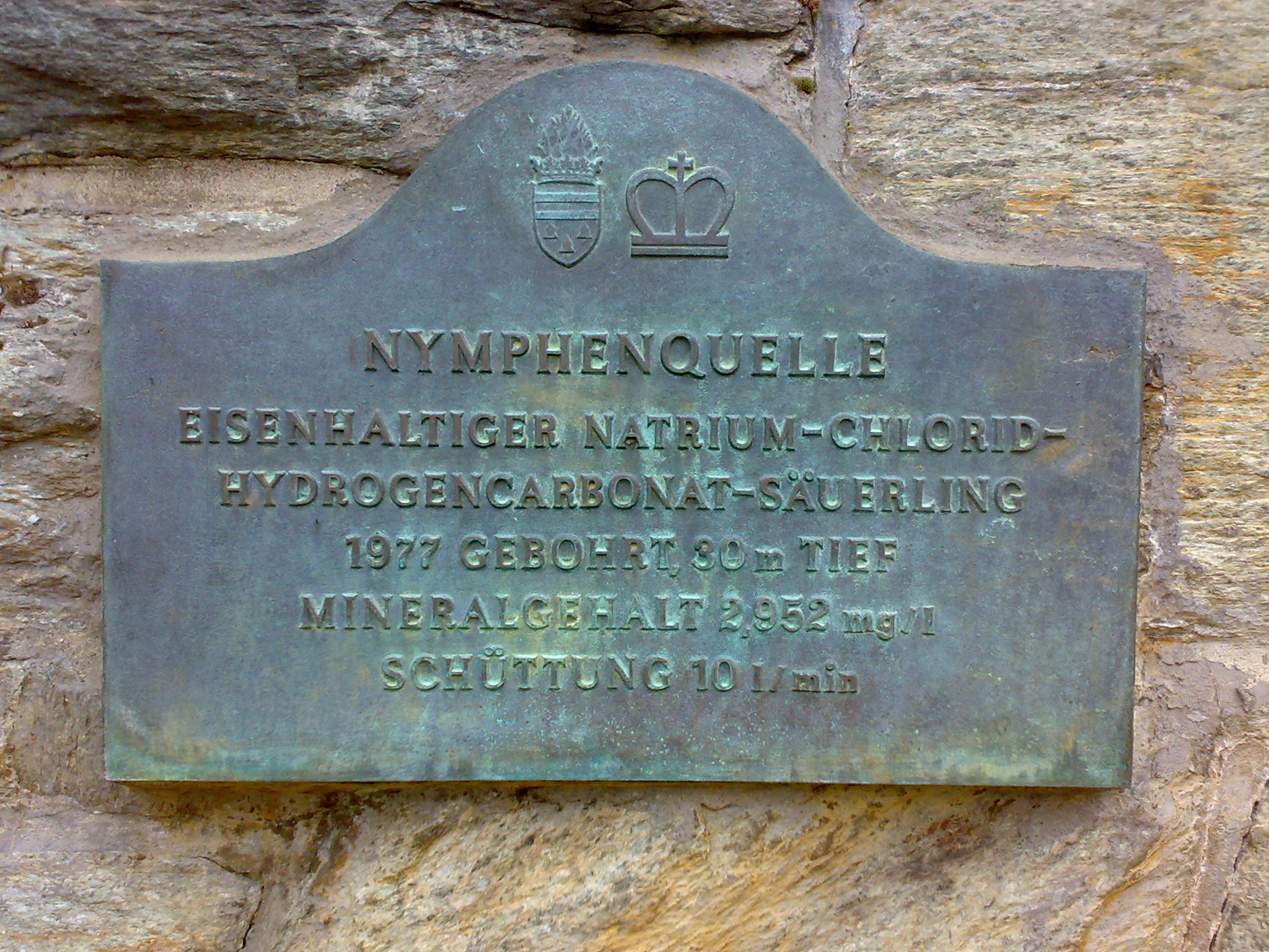 Quellenpark Kronthal, Nymphenquelle